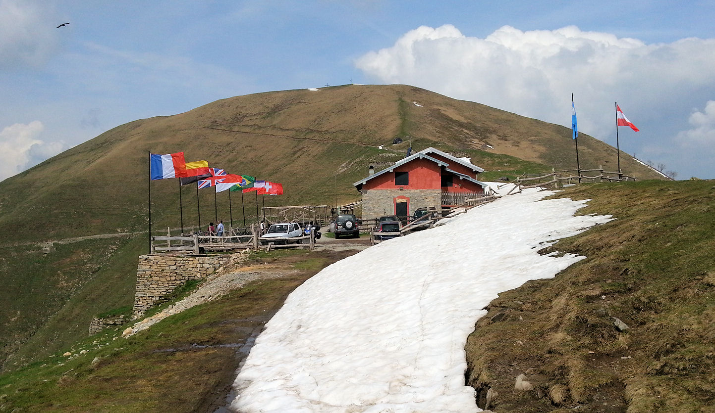 Il Rifugio Venini (Lenno) ripreso dal lato sud-est, sullo sfondo del Monte Galbiga. Poco sopra il rifugio, sulla verticale del tetto, si scorge la cupola nera dell'osservatorio astronomico Monte Galbiga.